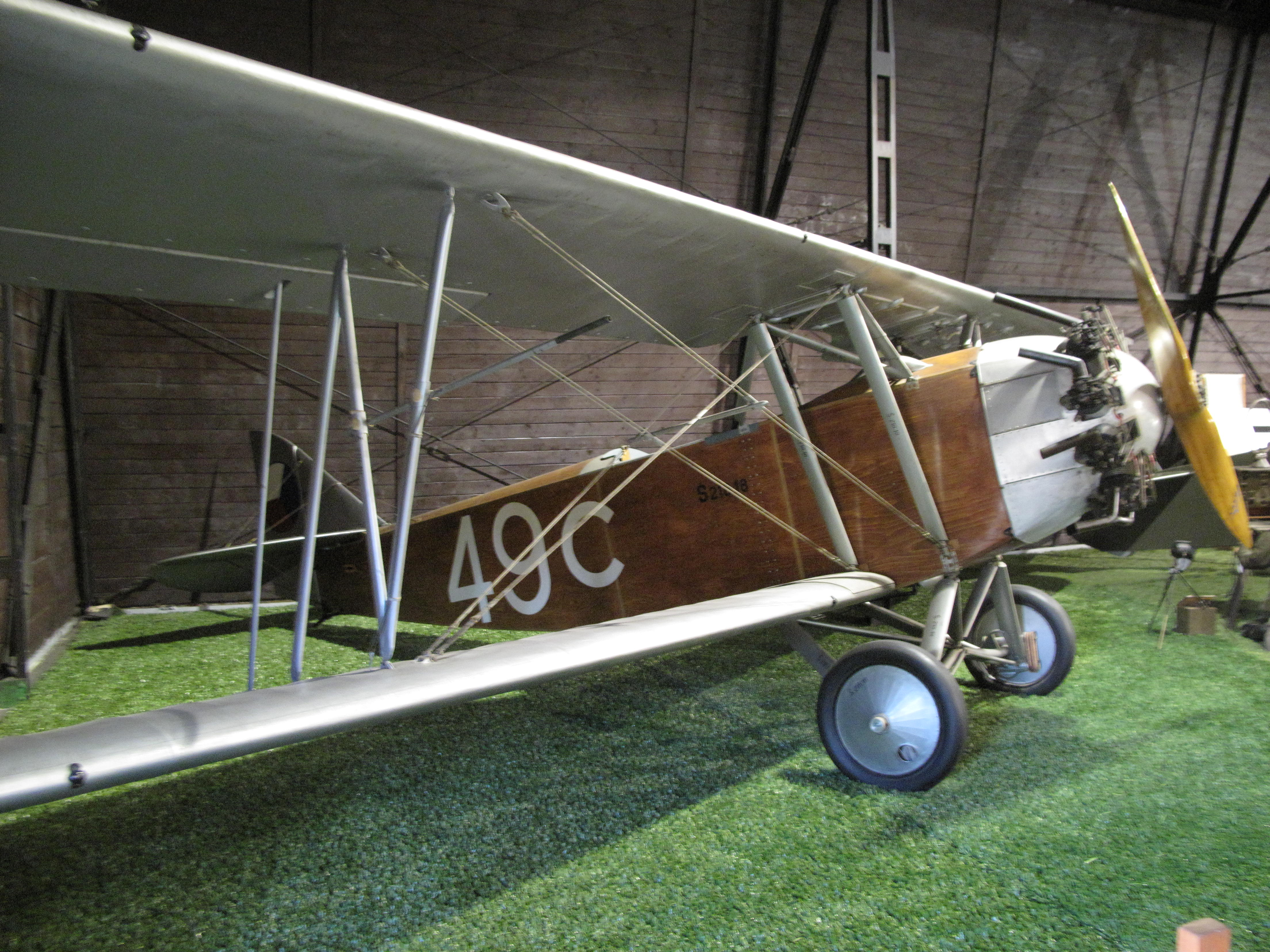 Letov S-218, Letecké muzeum Kbely